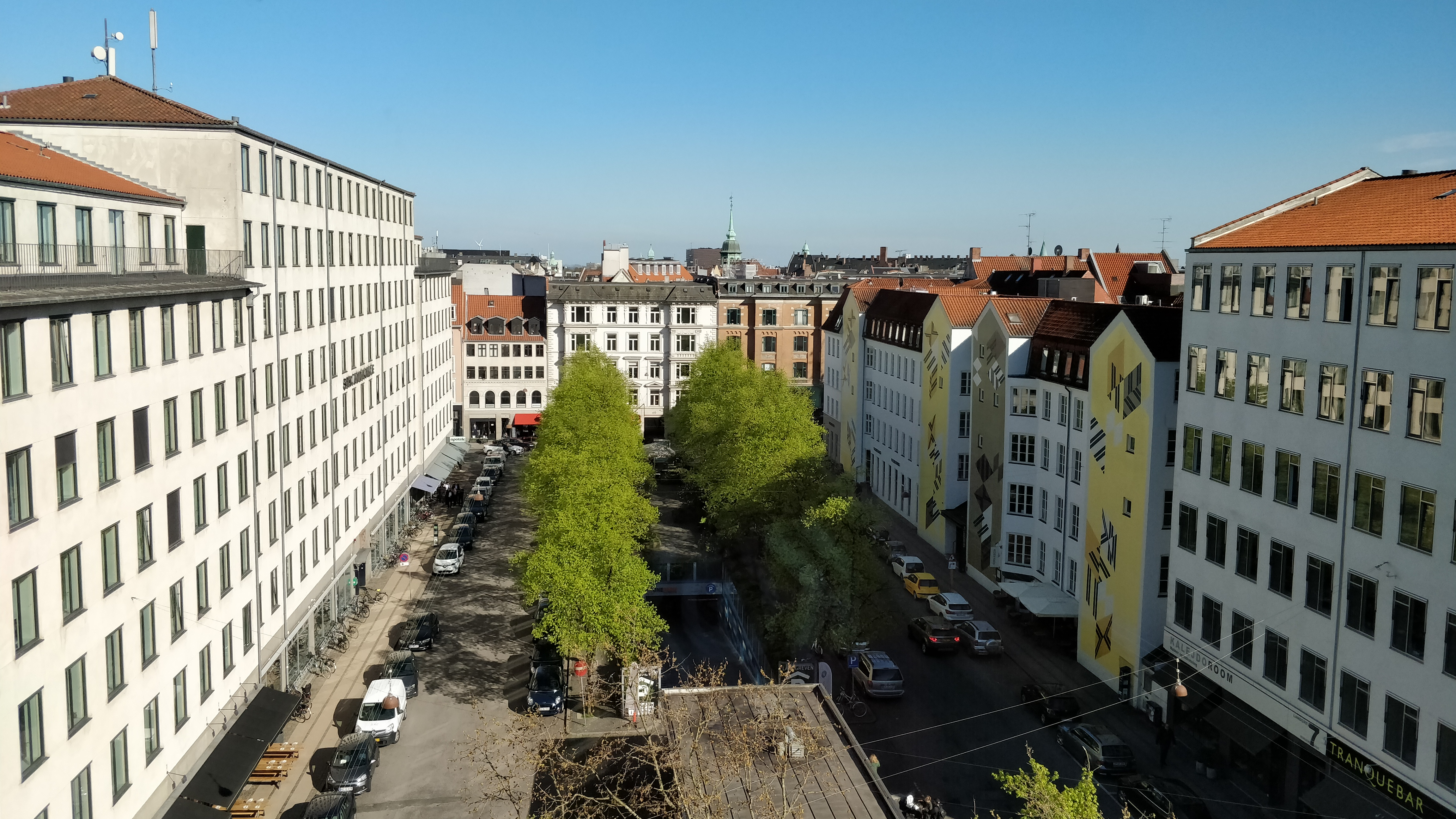 Landgreven in Copenhagen, Denmark